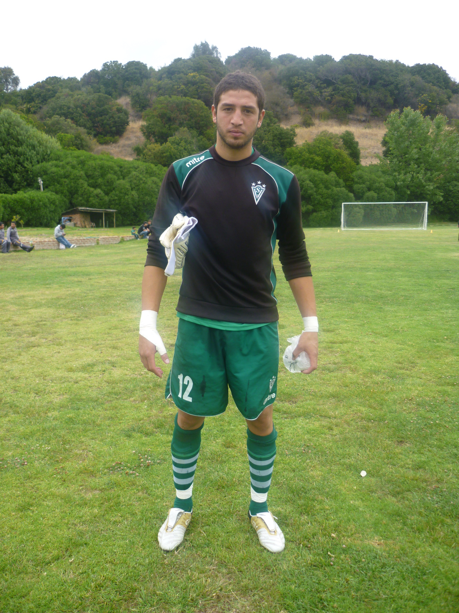 Fotografía del jugador de fútbol chileno/brasileño Mauricio Viana, segundo arquero del club de fútbol chileno Santiago Wanderers de Valparaíso.